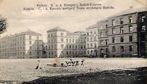 Kronprinz-Rudolf-Kaserne in Krakau